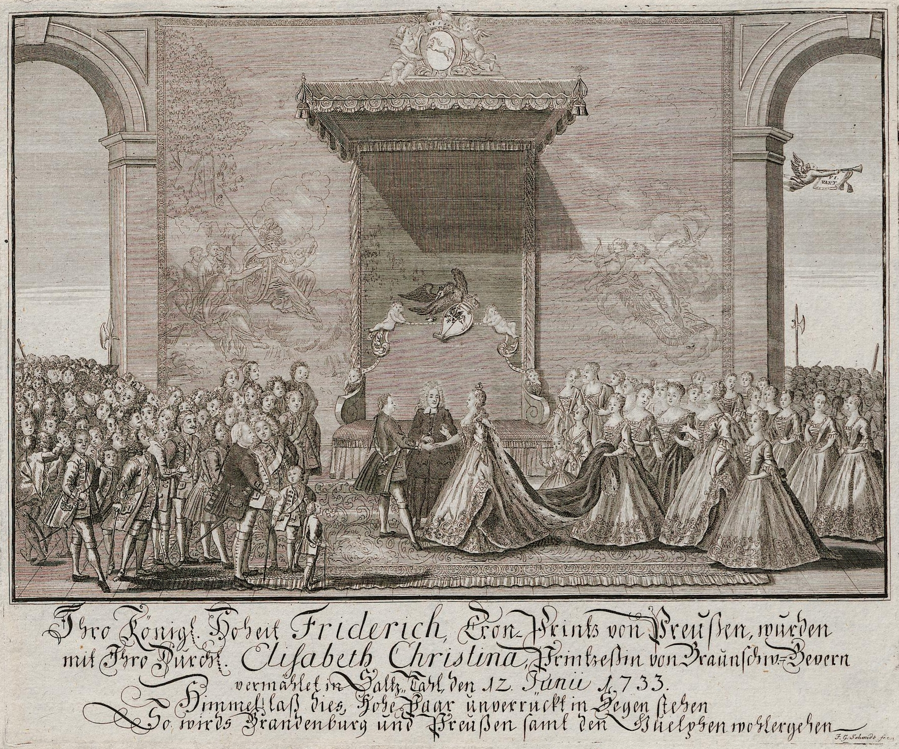 Grafik aus dem Klebeband Nr. 15 der Fürstlich Waldeckschen Hofbibliothek Arolsen Motiv: Hochzeit Friedrichs des Großen mit Elisabeth Christine von Braunschweig-Bevern 1733 auf Schloss Salzdahlum